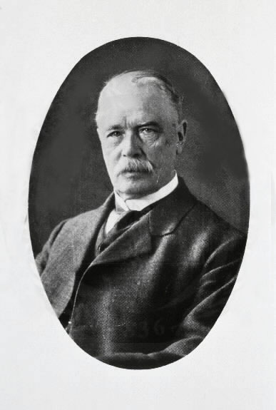 Porträtfotografie von Prof. Dr. med. Friedrich Trendelenburg (1844-1924)